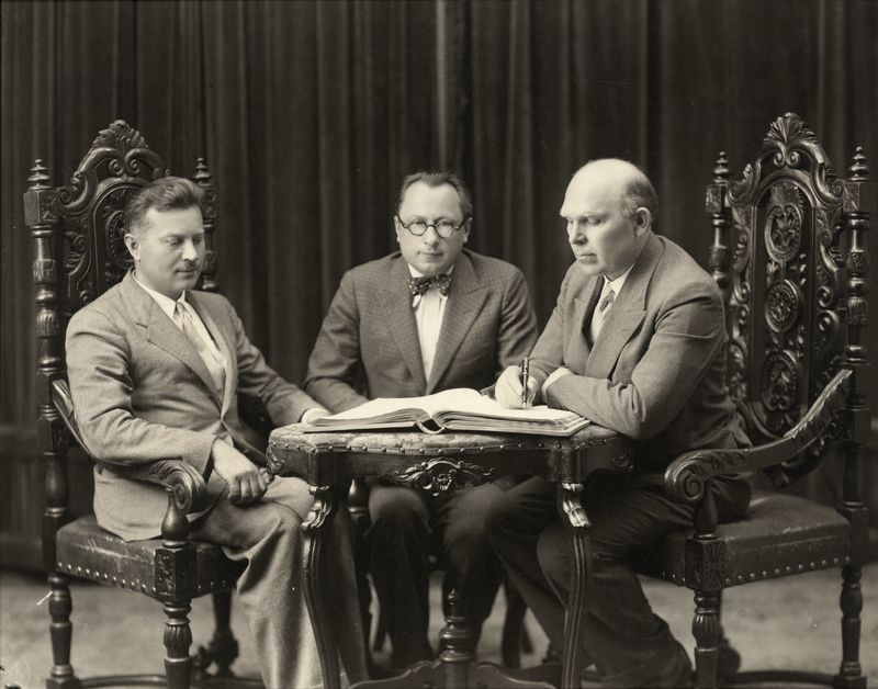 From left: Aleksandras Mykolas Račkus, Antanas Kalvaitis, and Rapolas Skipitis